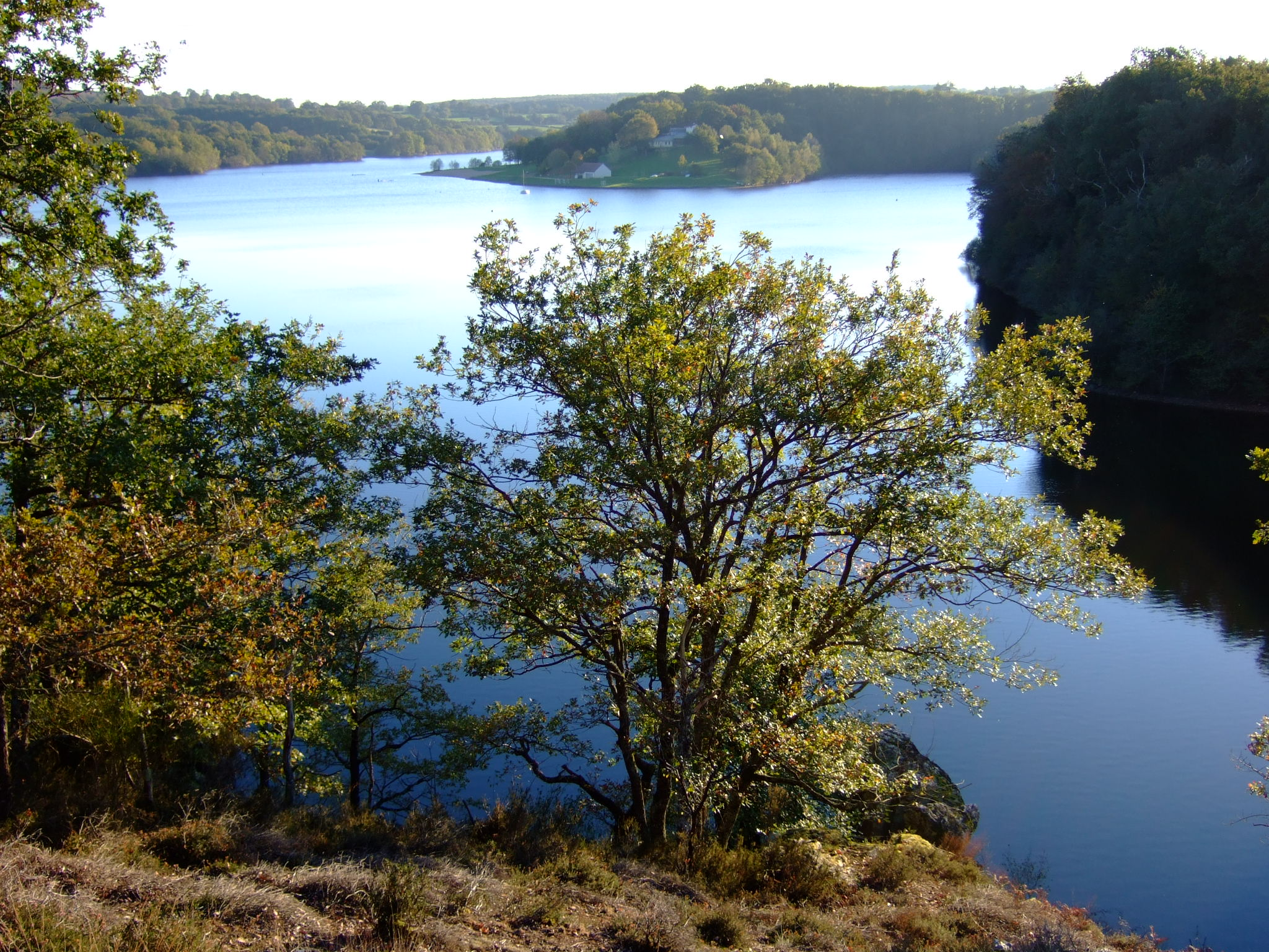 Le lac de Sidiailles - Photo amateur prise par moi-même